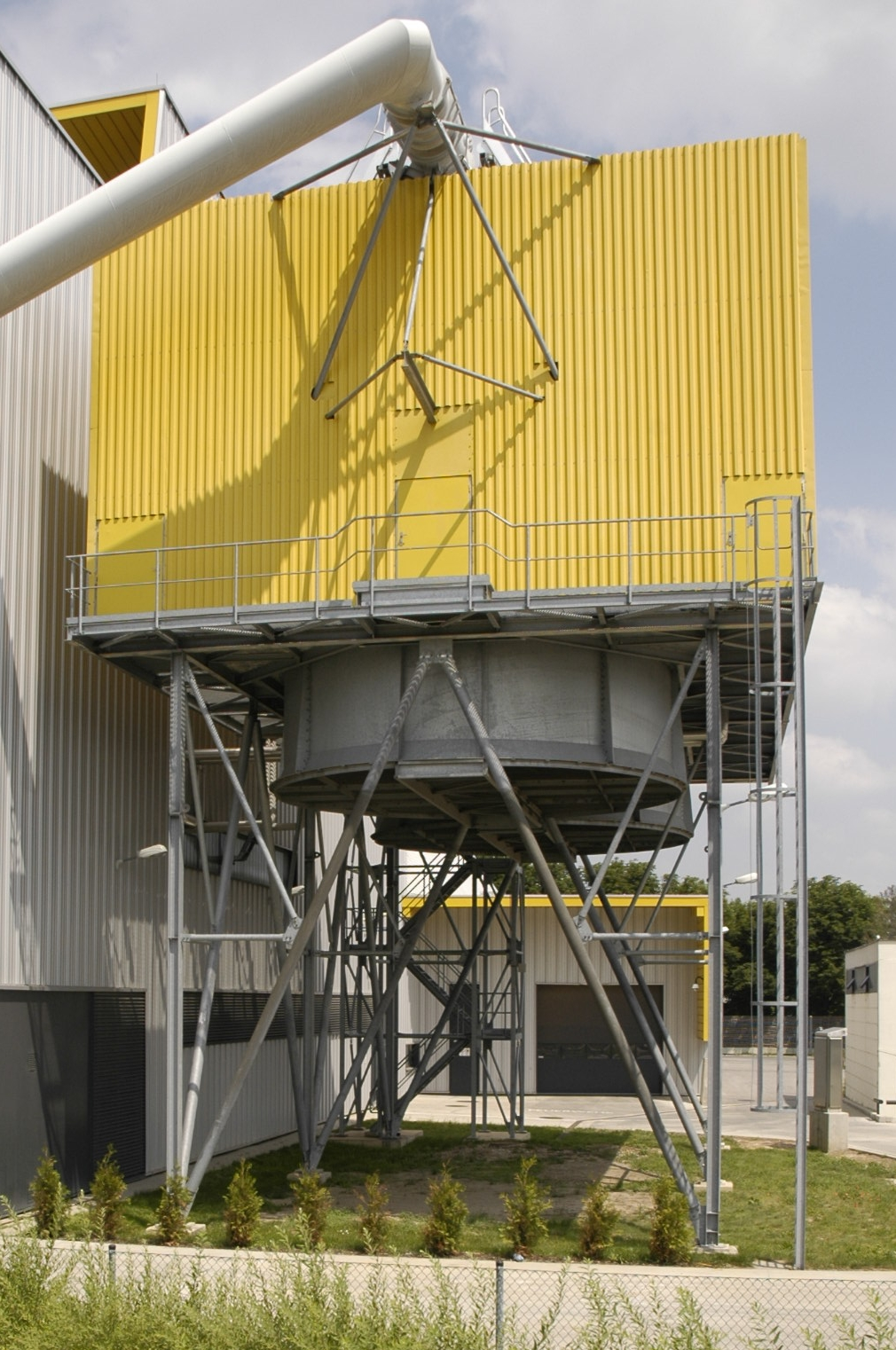 LUKO des Biomasseheizkraftweres Mödling